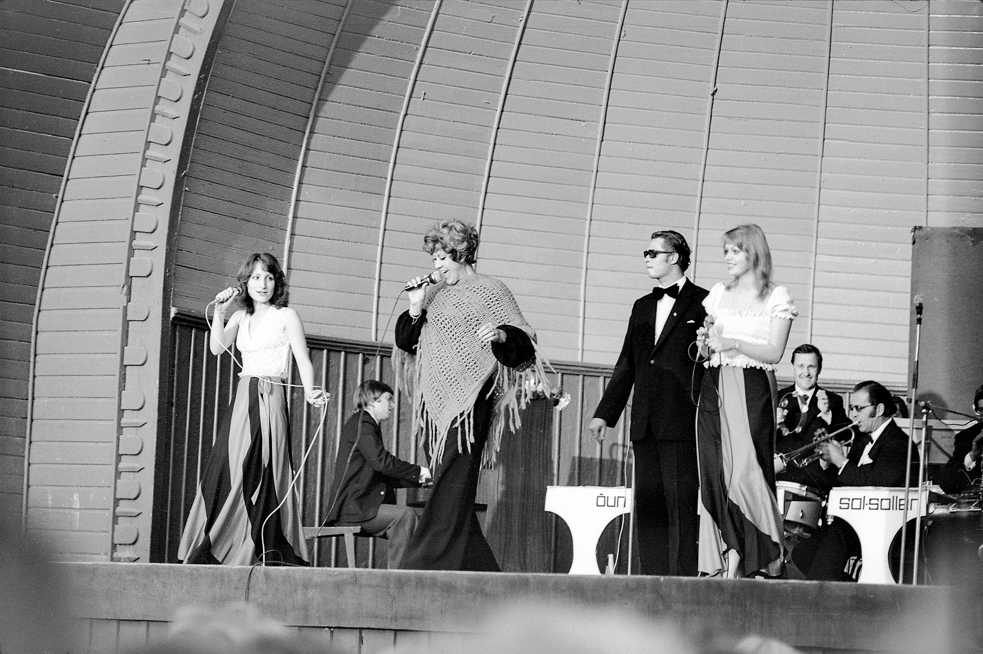 Heidy Tamme Kadrioru kõlakojas 74